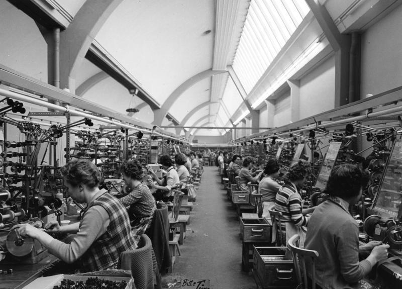 Nürnberg Grundig Radio-Werke Blick in die Spulenwickelei des Tonbandgerätewerkes Bayreuth